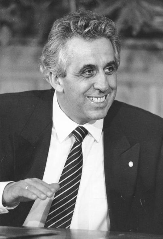 Egon Krenz ADN-ZB/Mittelstädt/18.10.1989/Berlin: Treffen/ Unter dem turnusmäßigen Vorsitz der SED trat im Haus des Nationalrates der Zentrale Demokratische Block der Parteien und Massenorganisationen zusammen. Der Generalsekretär des ZK der SED, Egon Krenz, informierte die Teilnehmer über die Ergebnisse der Tagung des ZK der SED. Abgebildete Personen: Krenz, Egon: Vorsitzender der FDJ, Generalsekretär des ZK der SED, Staatsratsvorsitzender, DDR